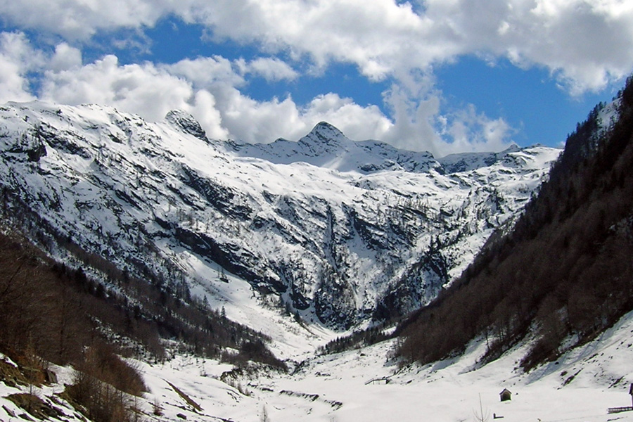 La Cima della Laurasca (al centro) in Val Loana, laterale della Val Vigezzo (VB)